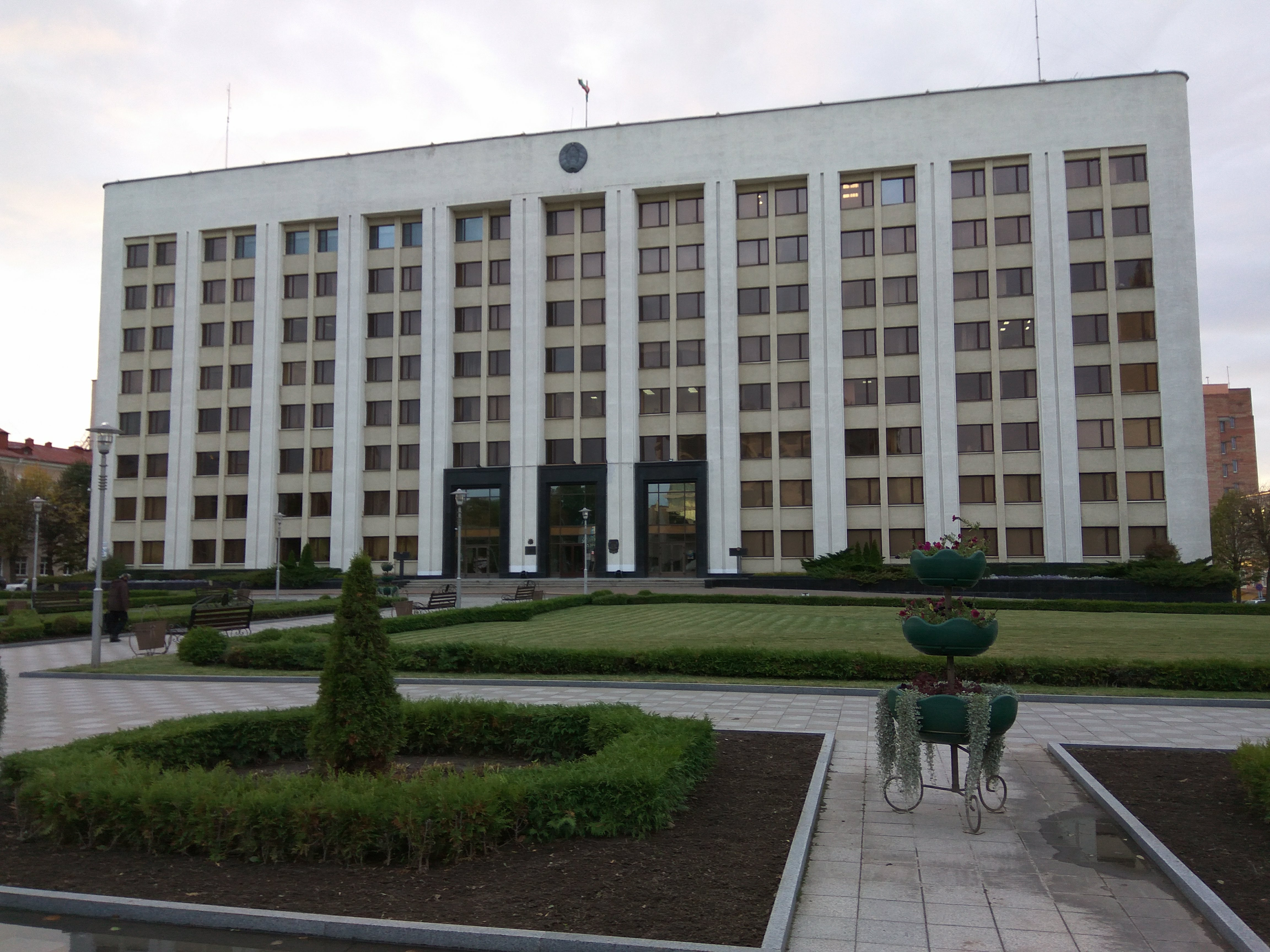 Магілёў. Вечаровая Першамайская